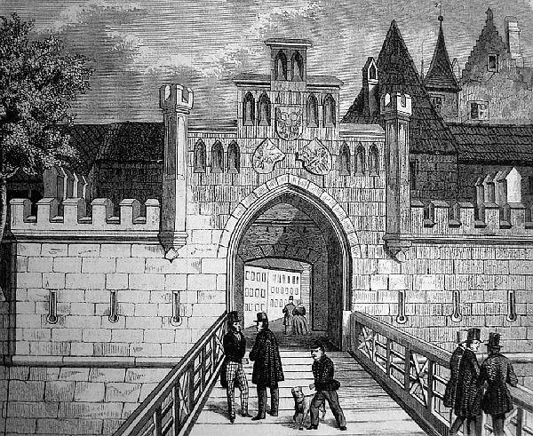 Das neue Tor an der Färbergasse in Nürnberg, Holzstich, vor 1900